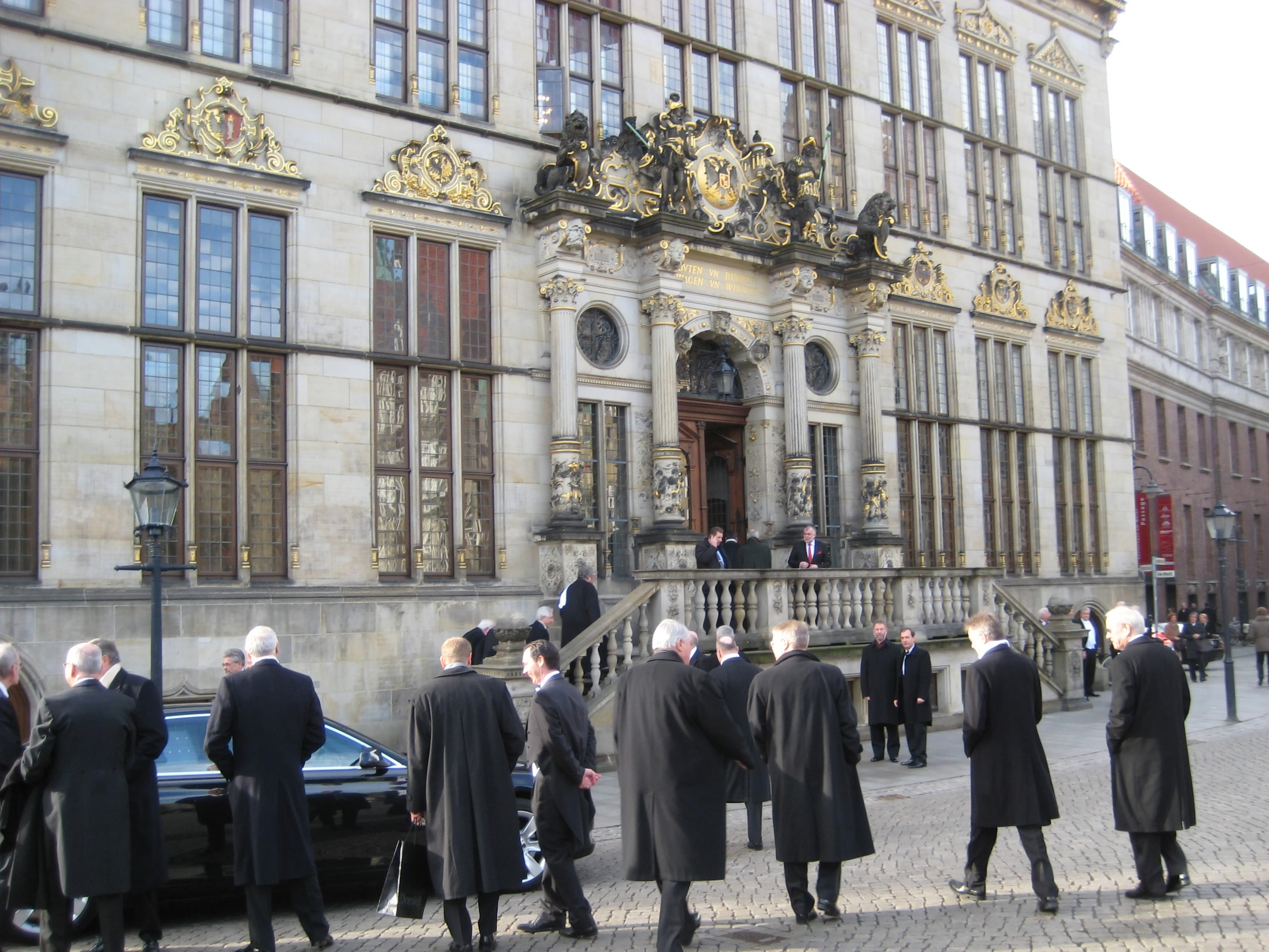 467. Schaffermahlzeit 2011: Eintreffen der Schaffer und deren Gäste, hier vor dem Eingangsportal von Haus Schütting, in dem der vorhergehende Empfang bei der dort ansässigen Handelskammer Bremen stattfindet.